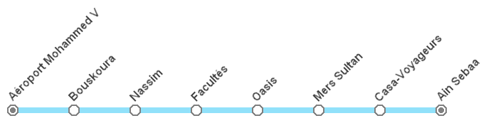 Plan du TNR Al Bidaoui de Casablanca